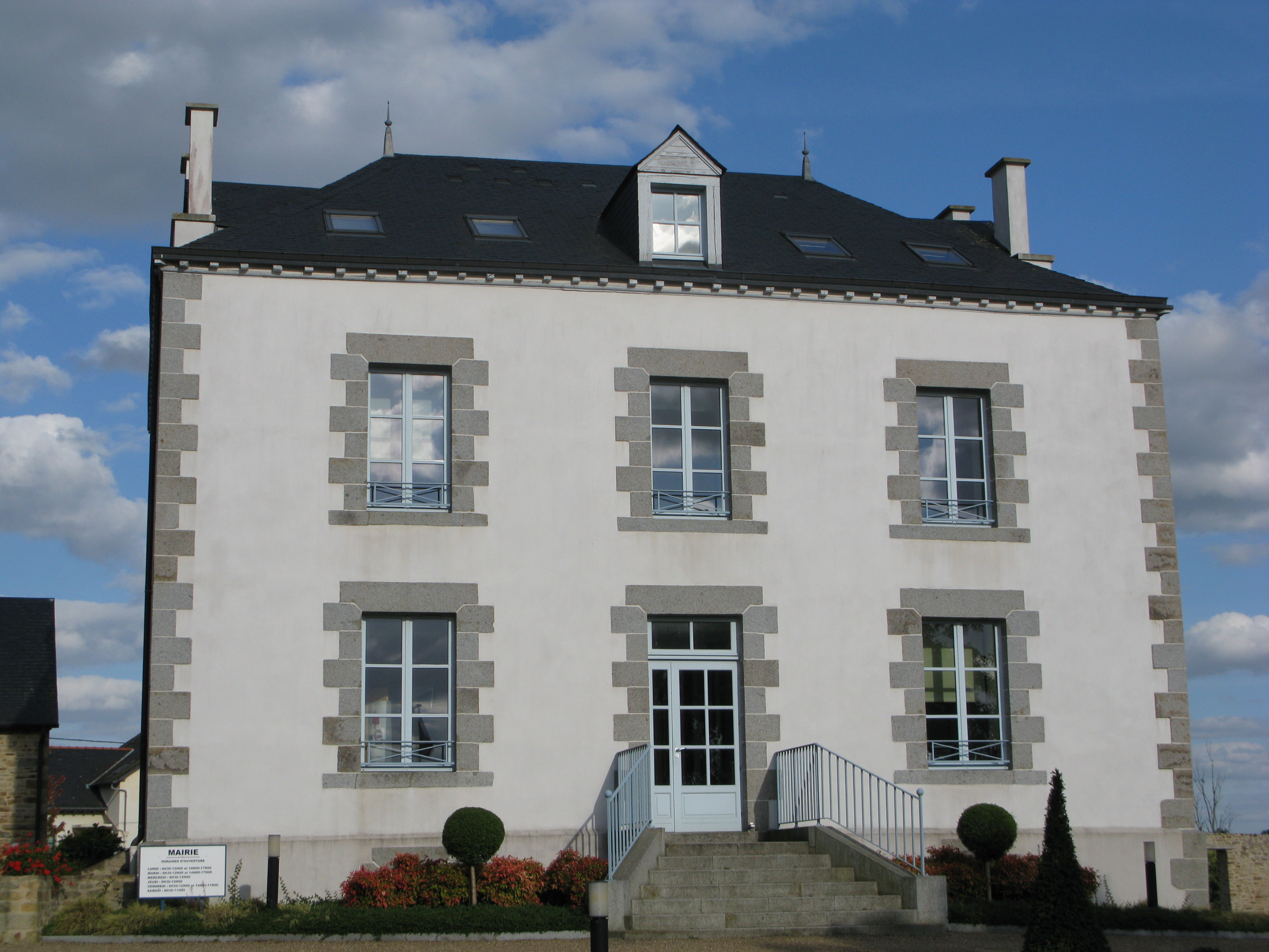 Mairie de Rannée